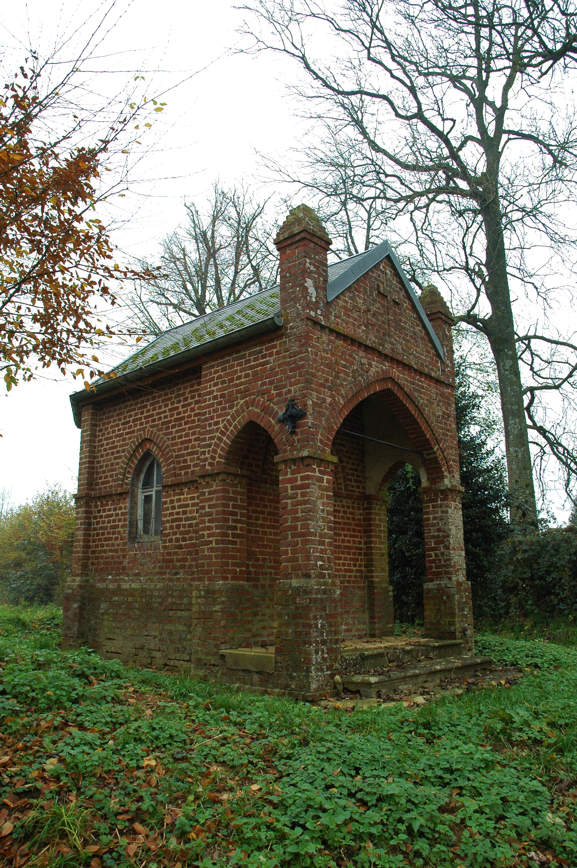 La Chapelle Nôtre Dame de Lourdes